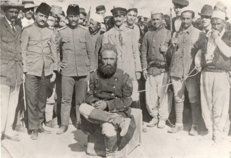 Te sjellurit e Haxhi Qamilit lidhur ne Durres, perpara pallatit ku banonte Esad Pasha me 12 korrik 1915